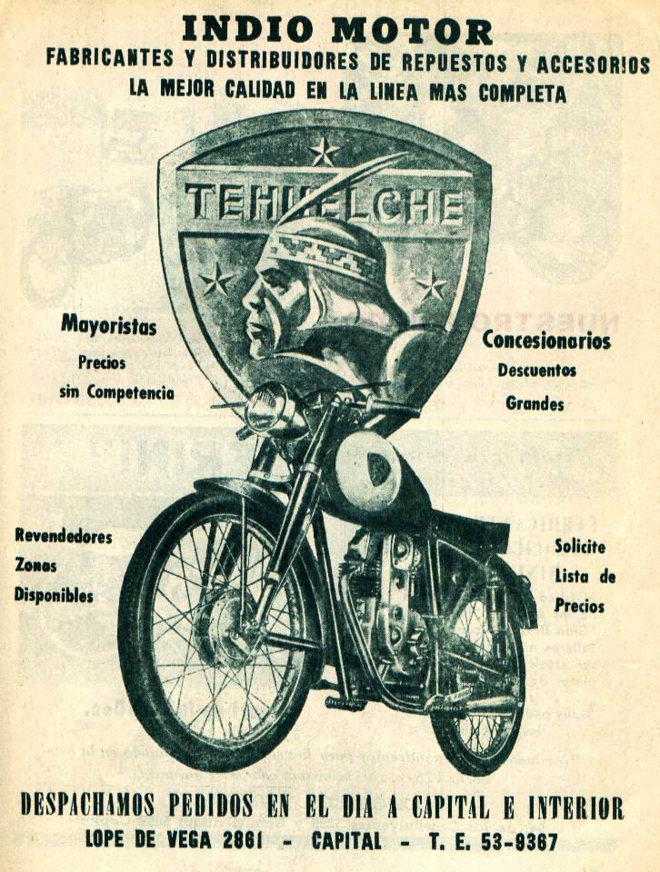 Advertisement for "Tehuelche", a brand of motorbikes.